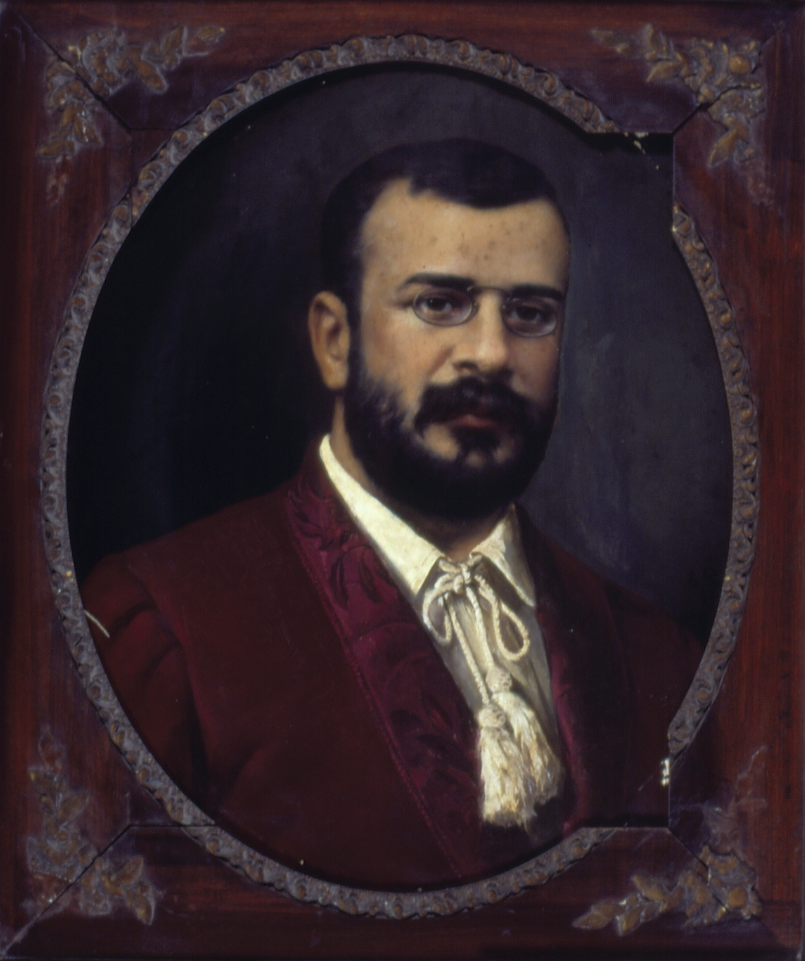 Obra que integra o acervo do Museu Paulista da USP. Coleção Fundo Museu Paulista.